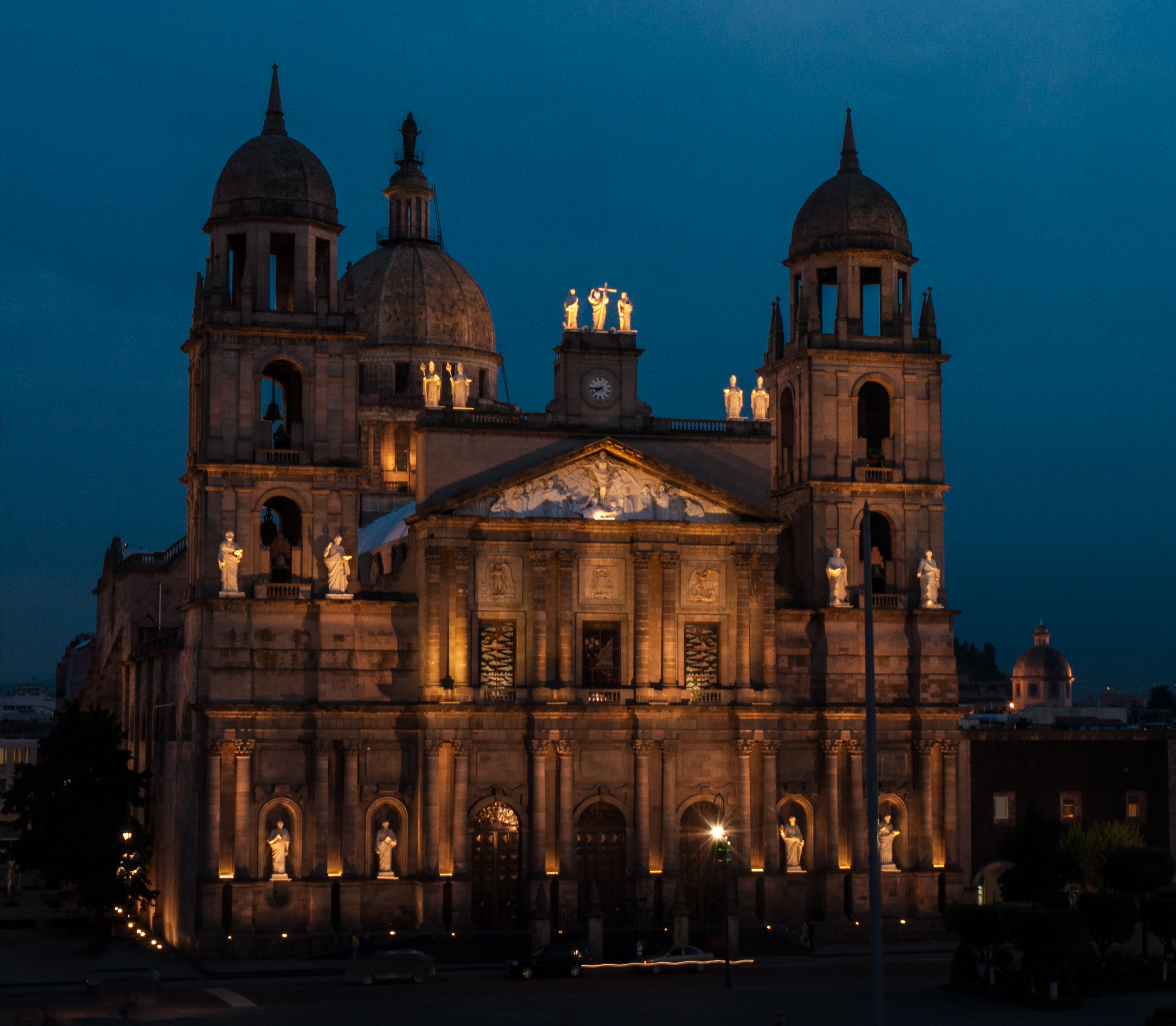 Antes de la Catedral de Toluca, existió el Convento de la Asunción de María, el cual fue construido a mediados del siglo XVI por los Franciscanos para la evangelización. En 1867 el convento es demolido y el 12 de mayo del mismo año se coloca la primera piedra para la construcción de la actual Catedral. El desarrollo de la obra fue lento durante casi un siglo, pero es retomado en 1951. El primer Obispo de Toluca, Mons. Arturo Vélez Martínez, logra su consagración el 11 de abril de 1978.